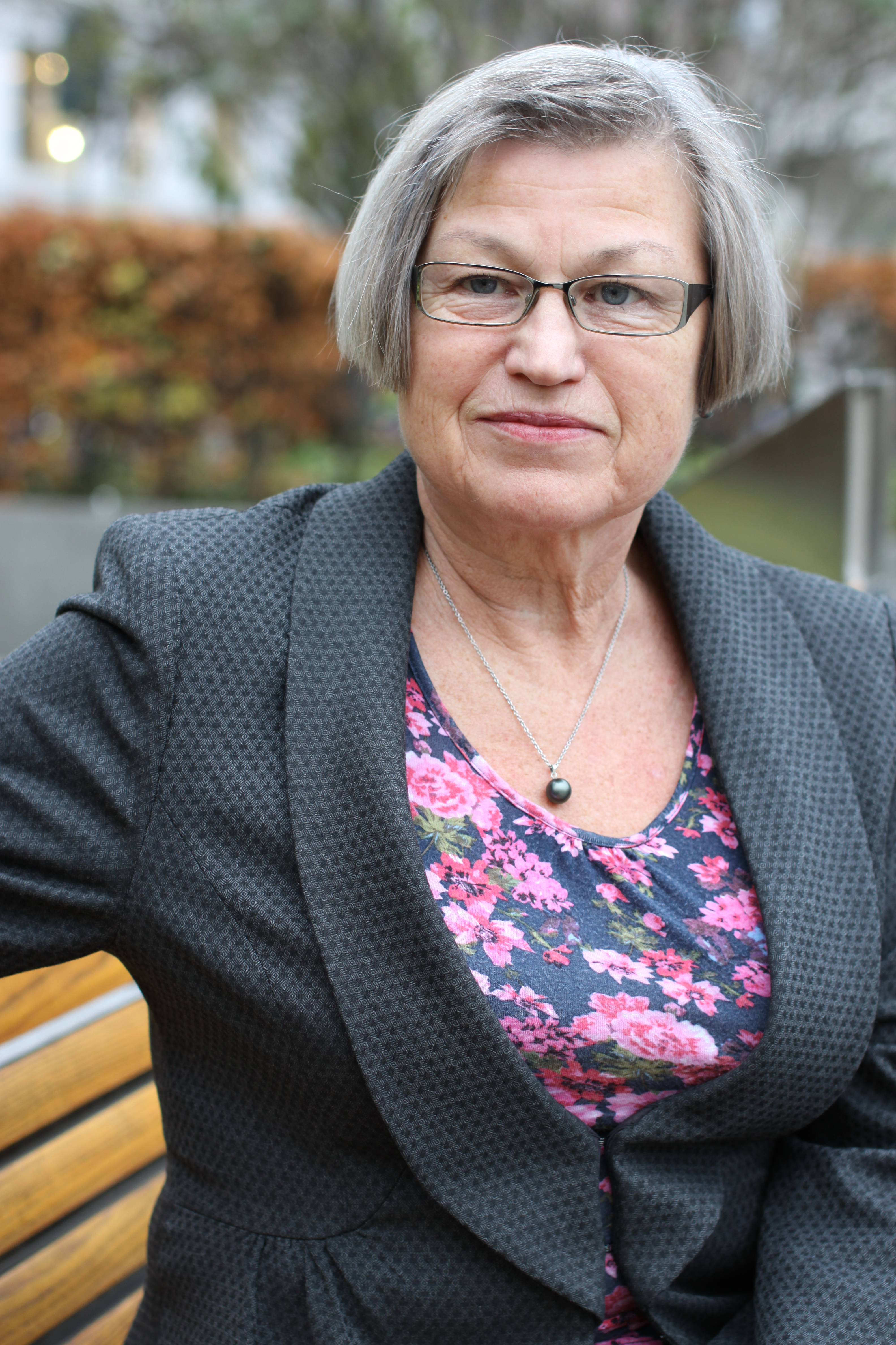 Stortingsrepresentant for KrF